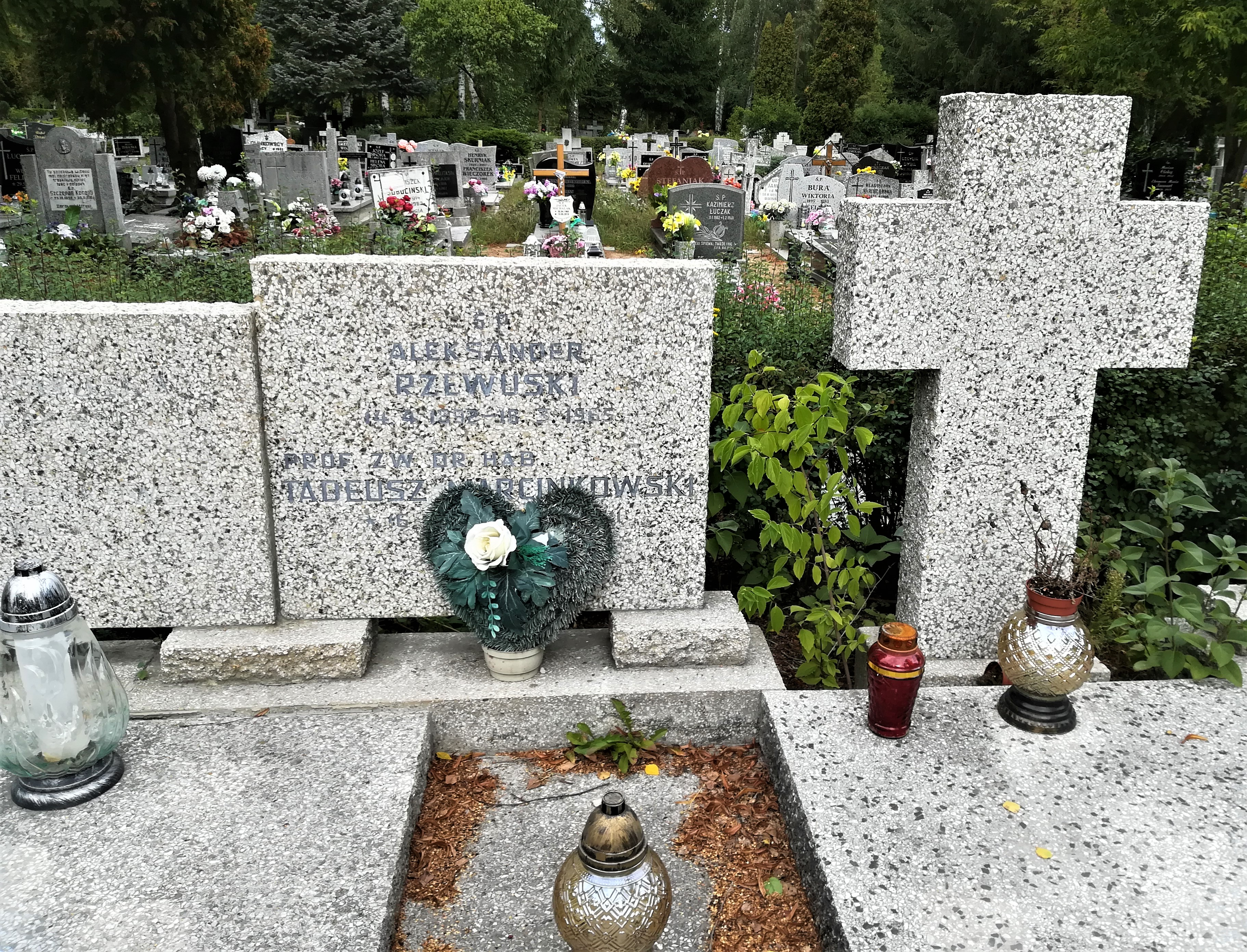 Grób prof. Aleksandra Rzewuskiego na cm. junikowskim w Poznaniu.